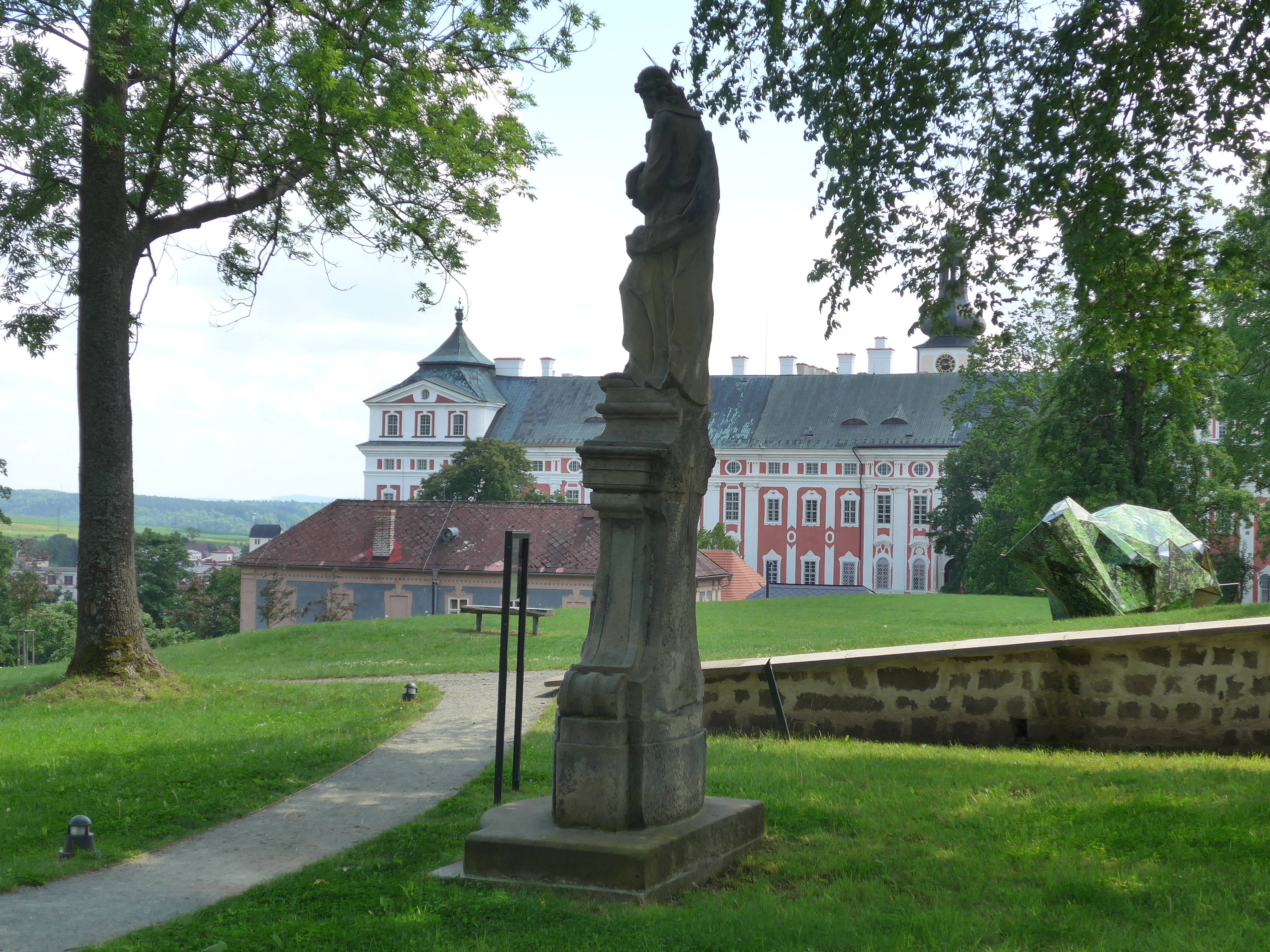 Pohled ze zahrady směrem ke klášteru